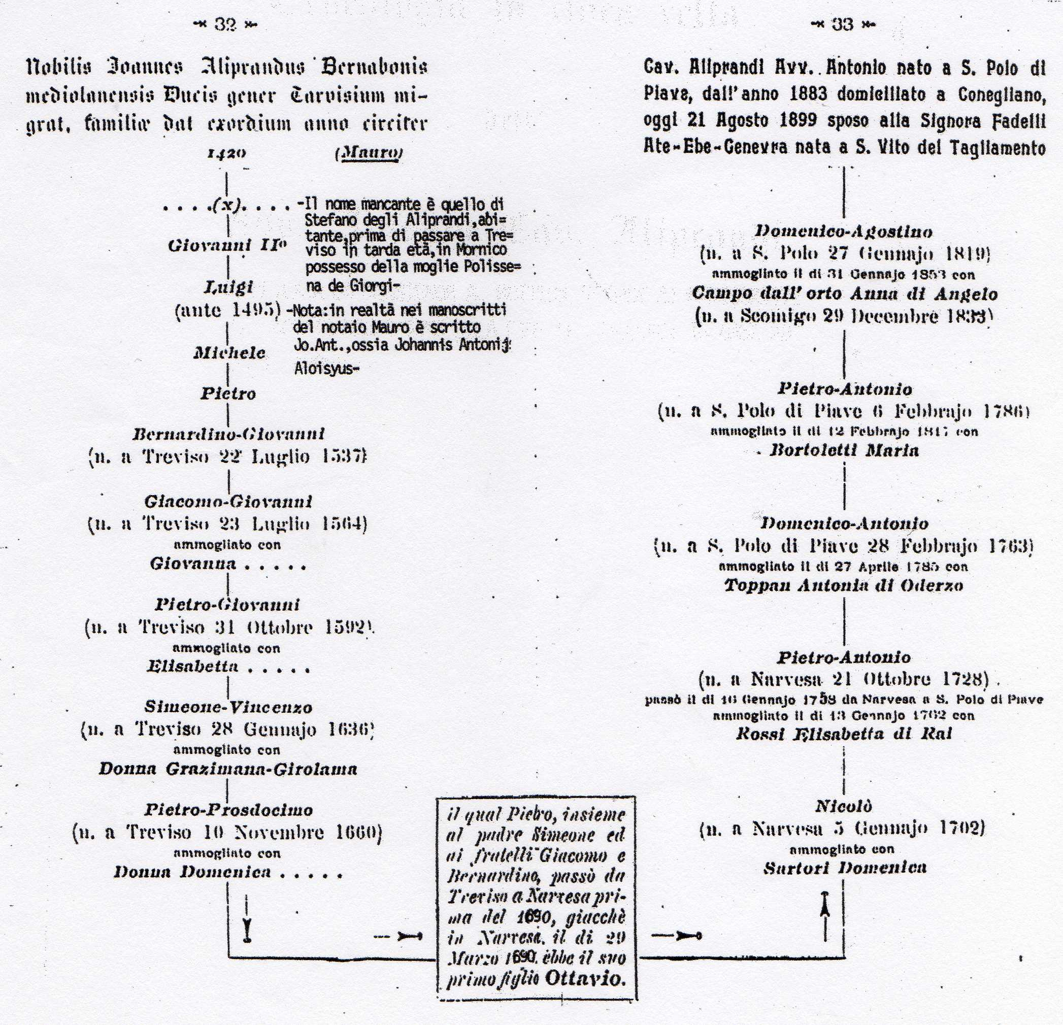 Don Vincenzo Botteon "Genealogia in linea retta dell'Avv. Antonio Cav. Aliprandi", compilata in base ai manoscritti del notaio Mauro sino alla fine del 1500 poi in base ad atti canonici. Note di Aliprando Fanzago degli Aliprandi